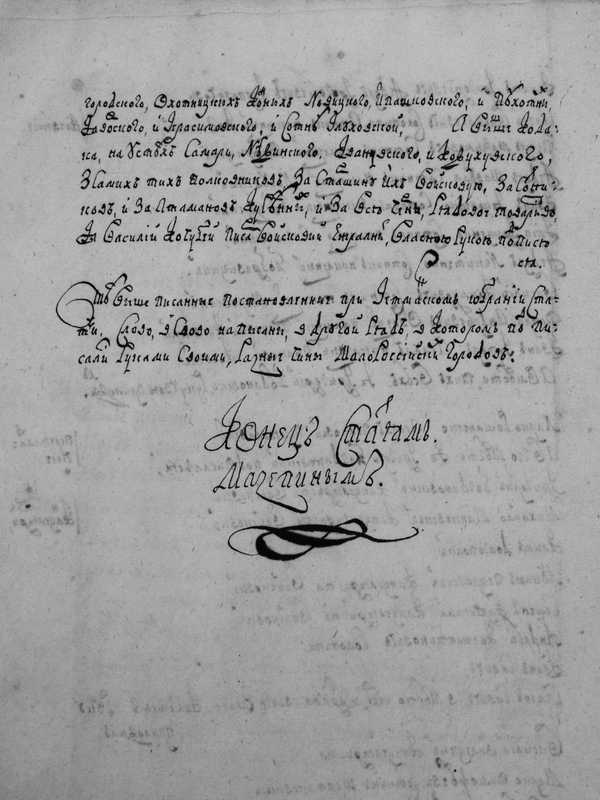 Коломацькі статті - договір, укладений між новообраним гетьманом Війська Запорозького Іваном Мазепою із старшиною та представниками московського уряду. 25 липня 1687. ЦДІАК України, ф. 220, оп. 1, спр. 210. арк. 1, 6, 6 зв.